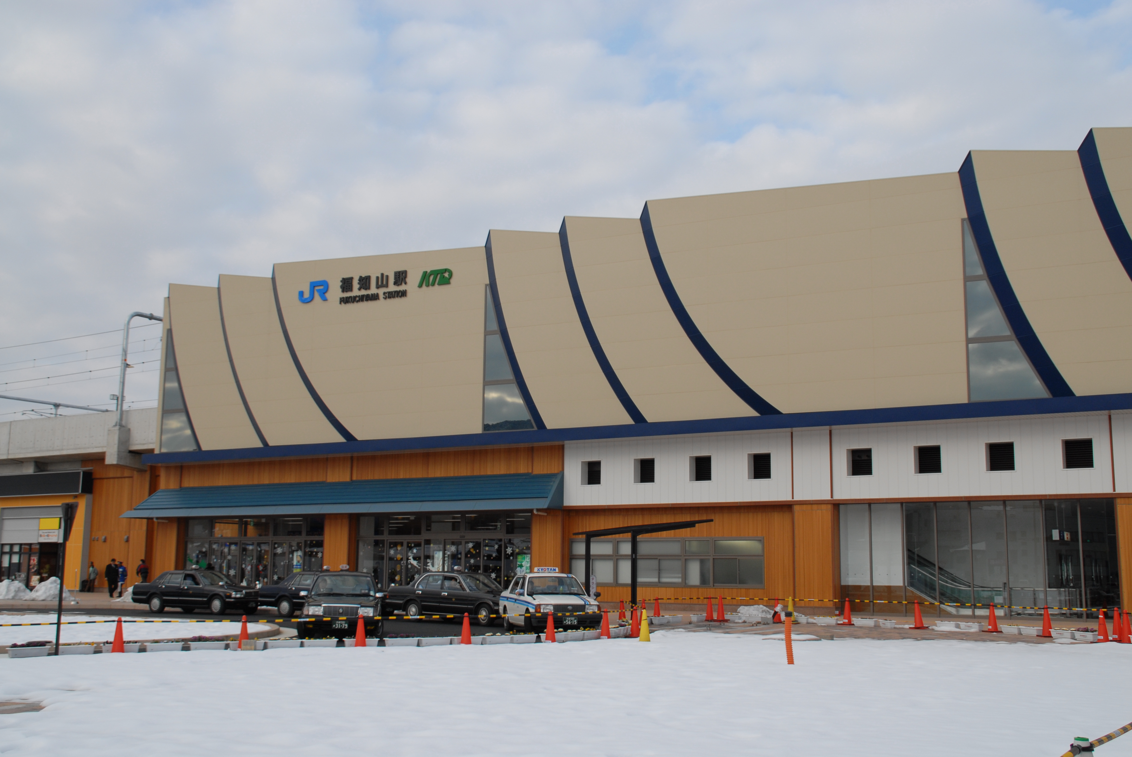 JR-WEST(JAPAN) Fukuchiyama Sta.